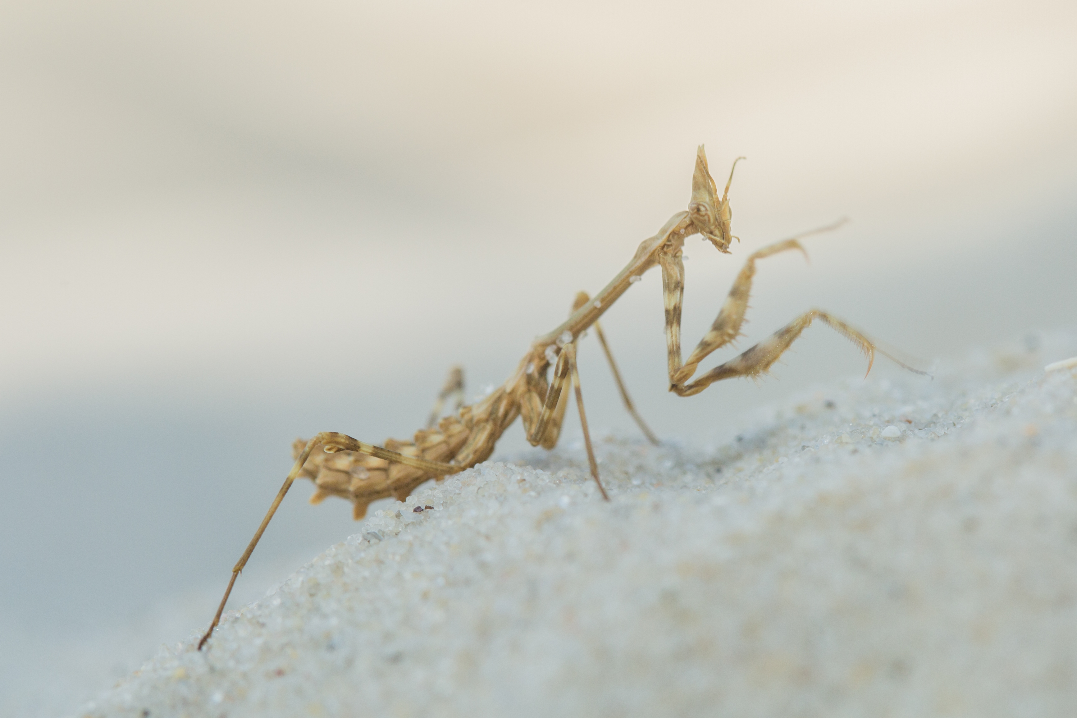 Знято під час експедиції на о. Джарилгач This photo/video of Dzharylhach was taken during Wikiexpedition to Dzharylhach supported by Wikimedia Ukraine.You can see all photographs in category Category:Wikiexpedition to Dzharylhach. English | українська | +/−